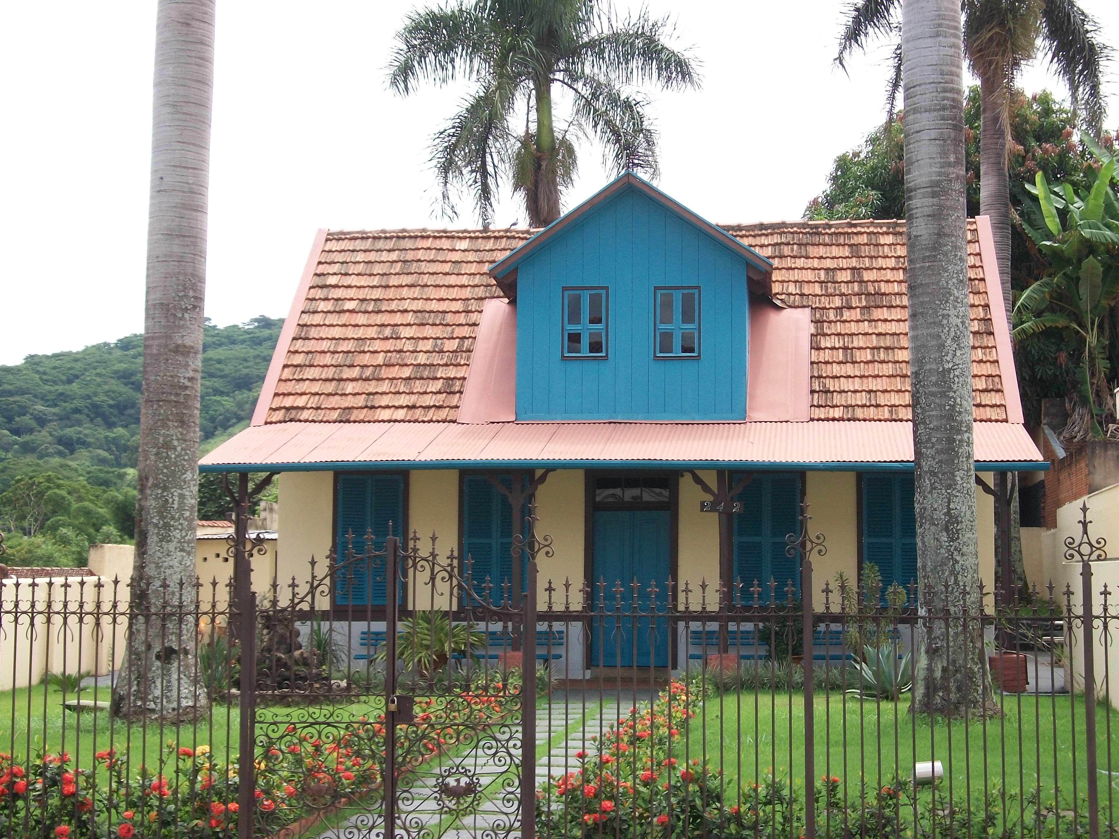 Casa de Cultura "Marcelo Grassman", em São Simão-SP, fevereiro de 2010.